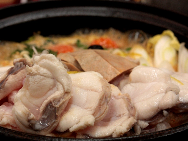 茨城県大洗町冬の名物 あんこう鍋